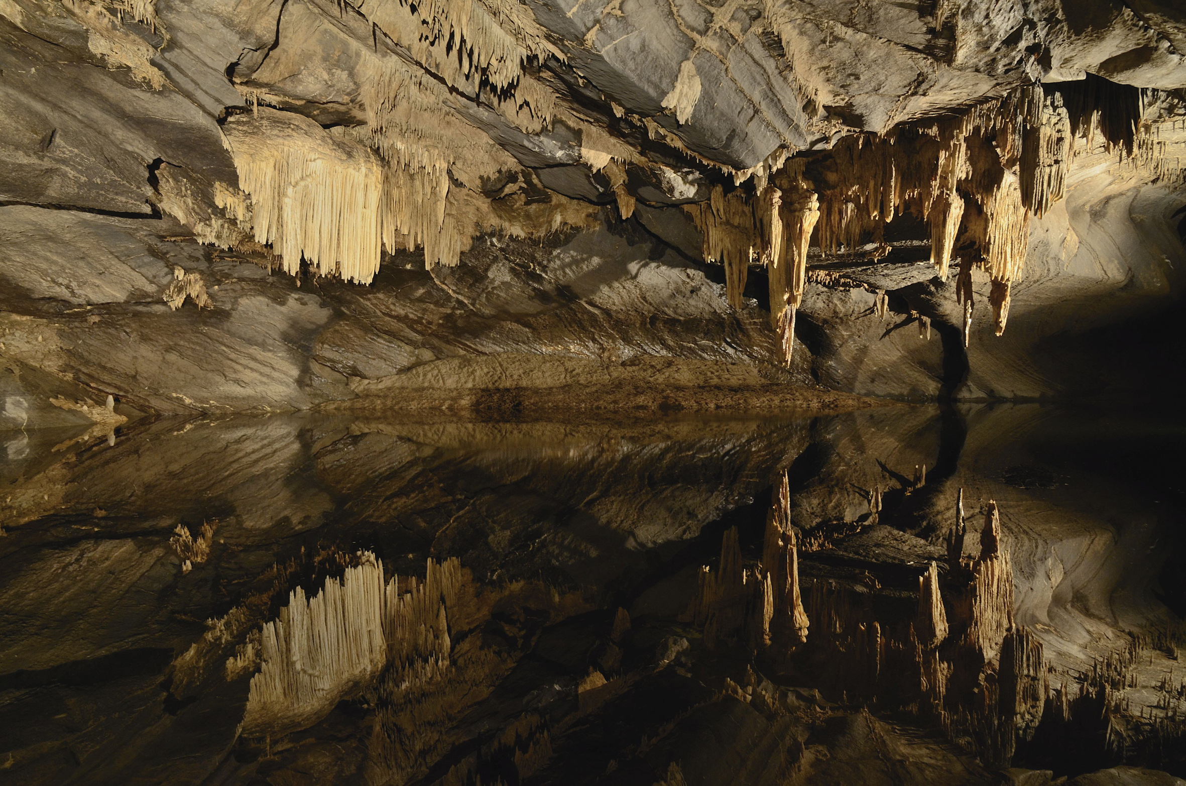 La Salles des Draperies. C'est une salle faisant partie de la grotte de Han-sur-Lesse, on peut y admirer le reflet des concrétions dans la rivière.